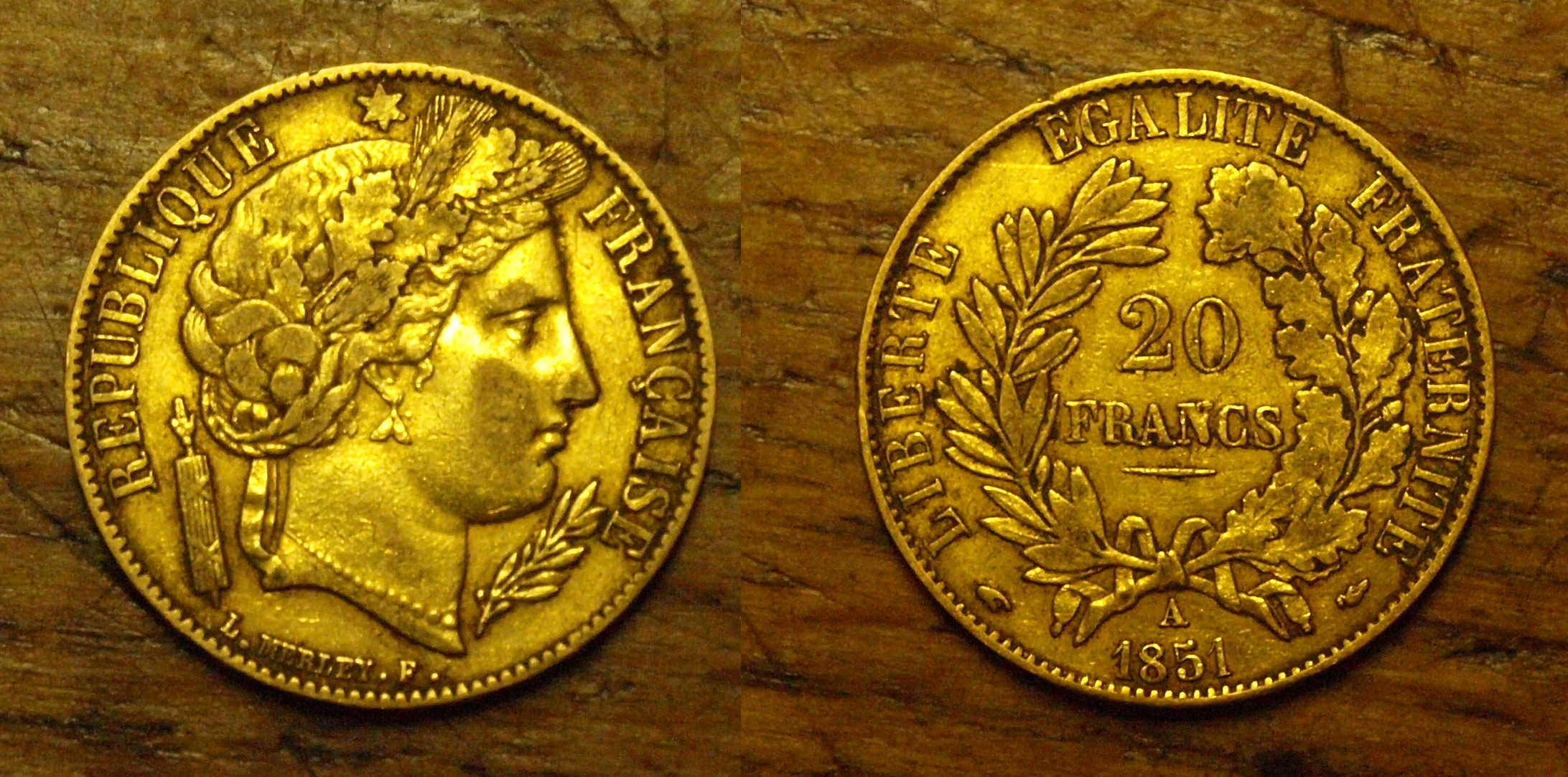 Marianne de 20 francs de la IIe république en 1851